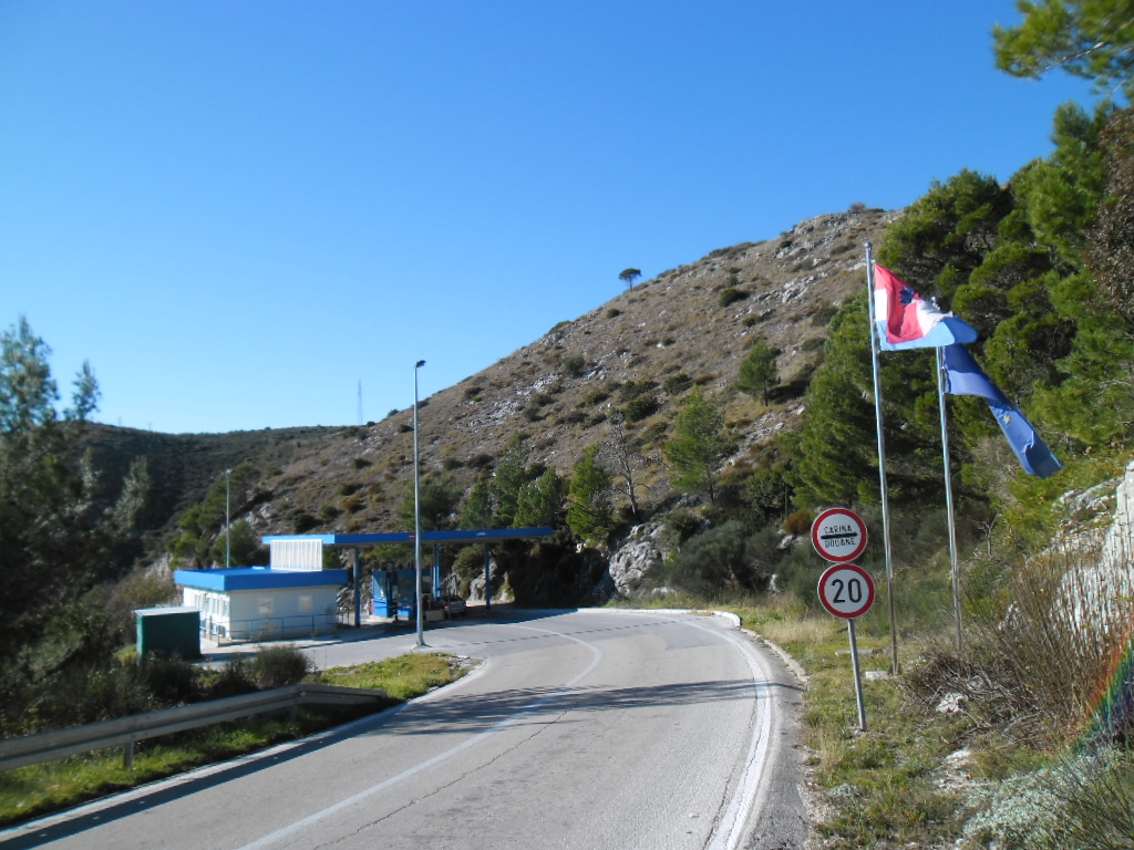 granični prijelaz Brgat